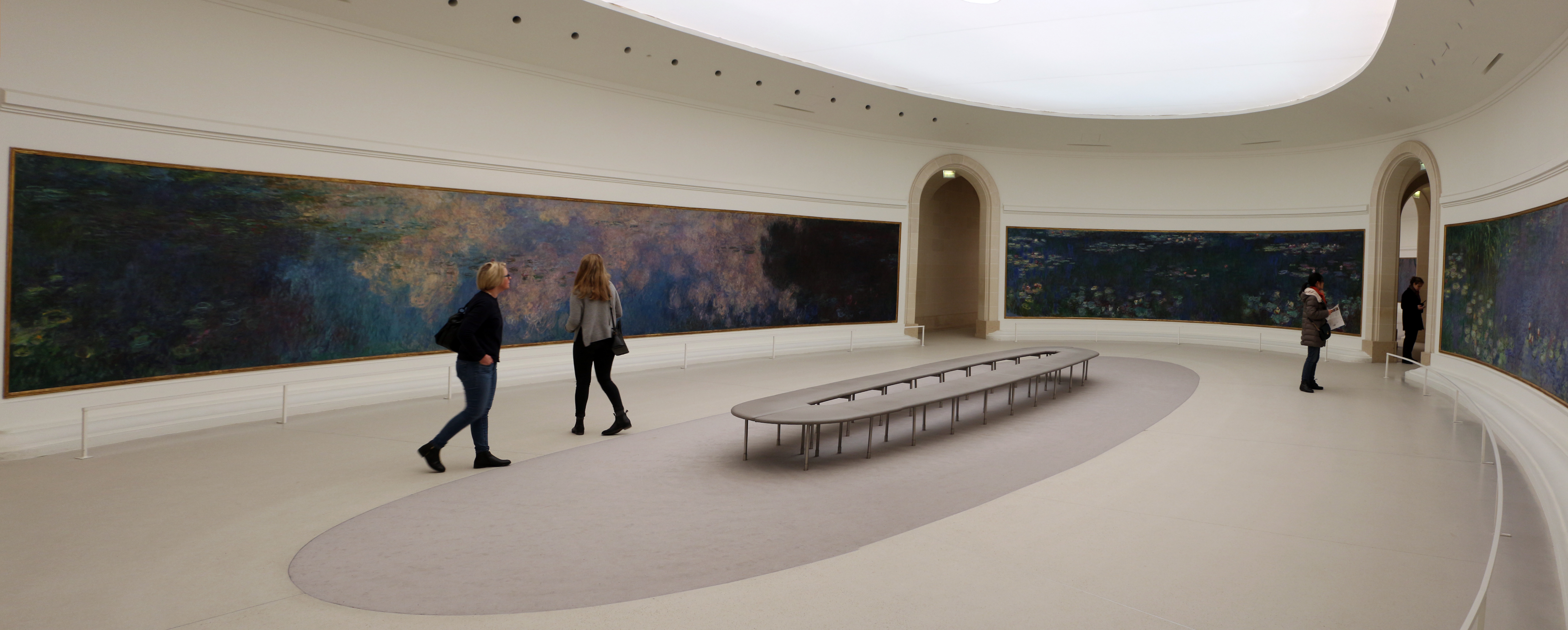 Claude monet, Ninfee e Nuvole, 1920-1926 (orangerie) 00.jpg